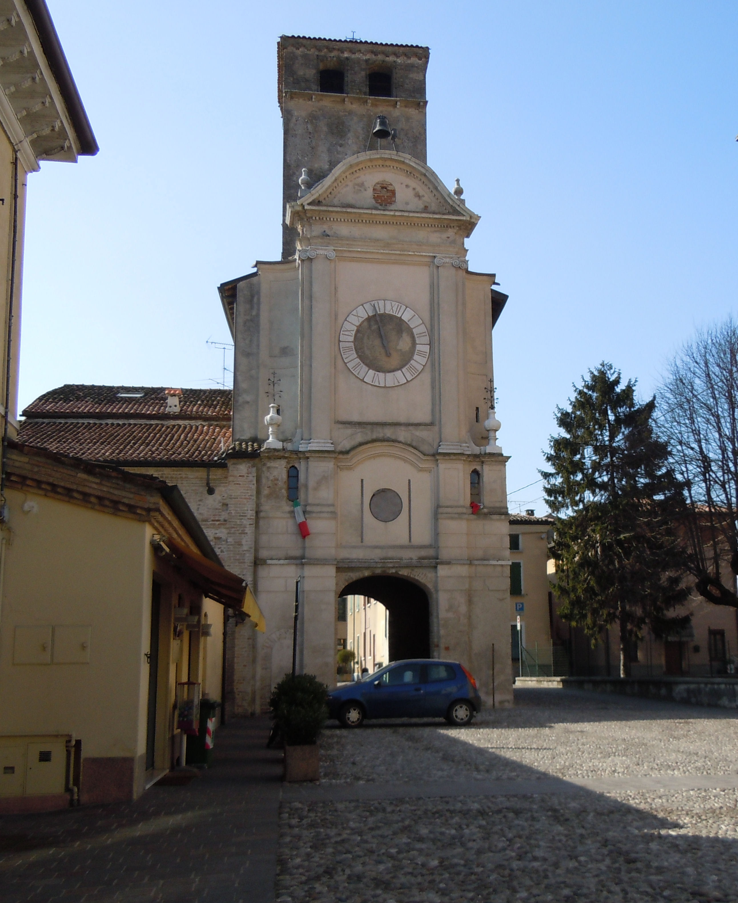 Medole, torre scudata.